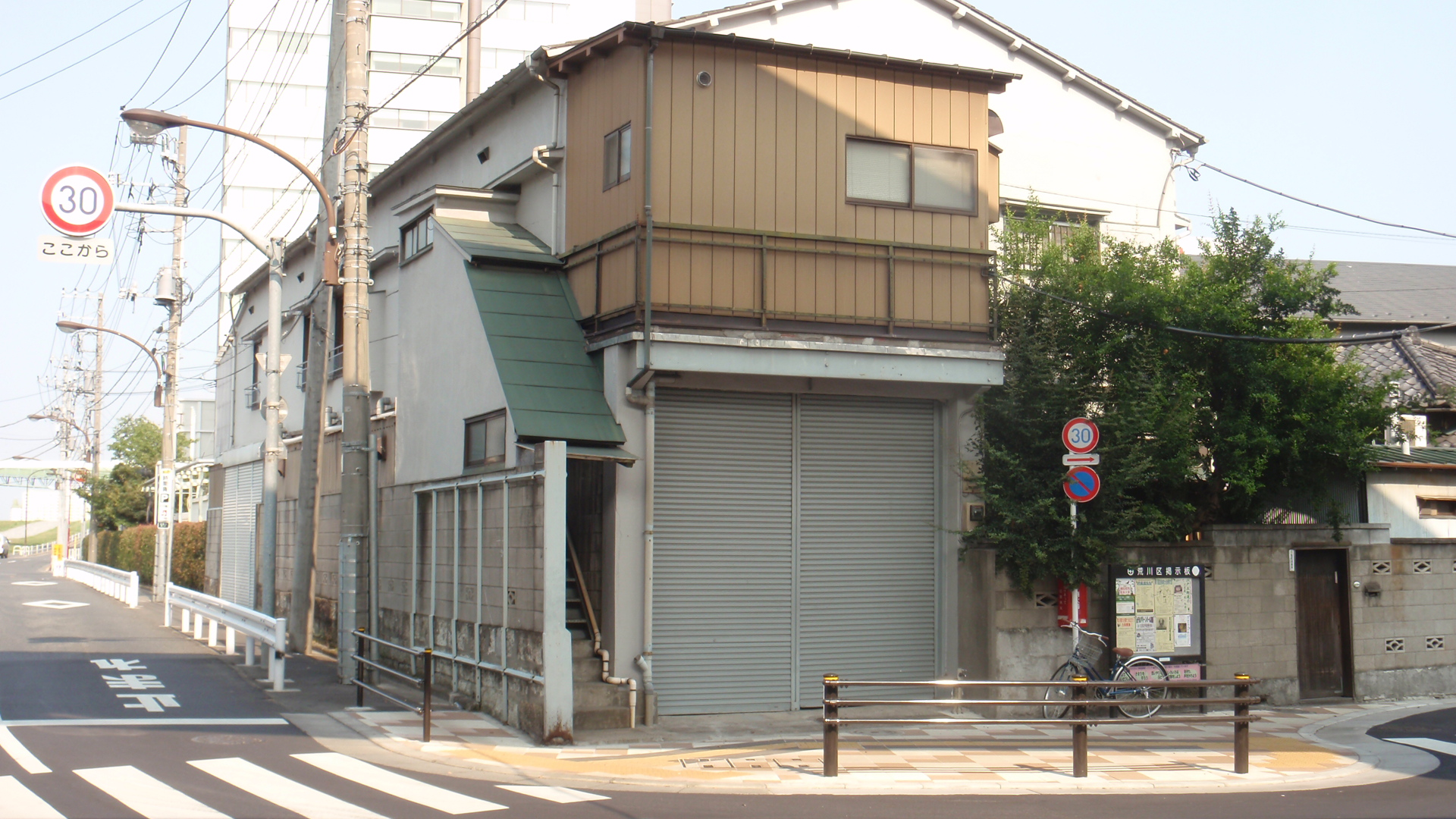 東京都荒川区東尾久八丁目4番7号に位置する「あおい荘」。 テレビドラマ『トリック』では「池田荘」の名で主人公の自宅として使用された。